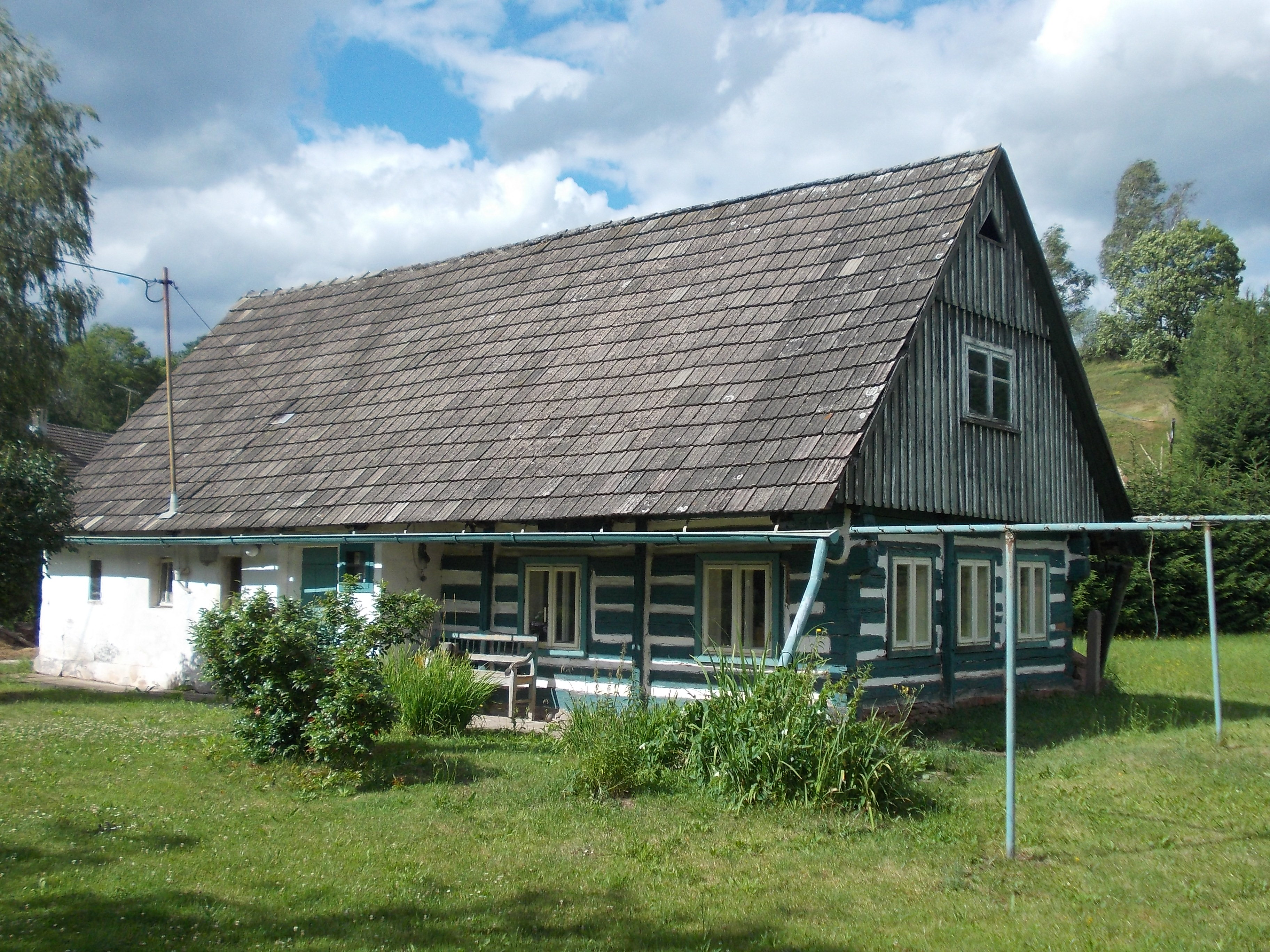 Horní Kalná - dům č.p. 145